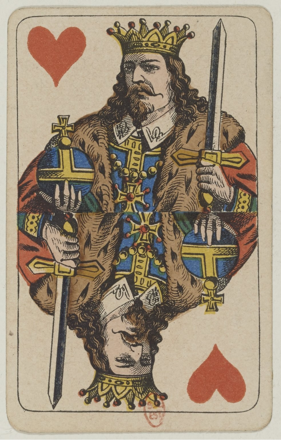 Król Kier z Wzoru Berlińskiego